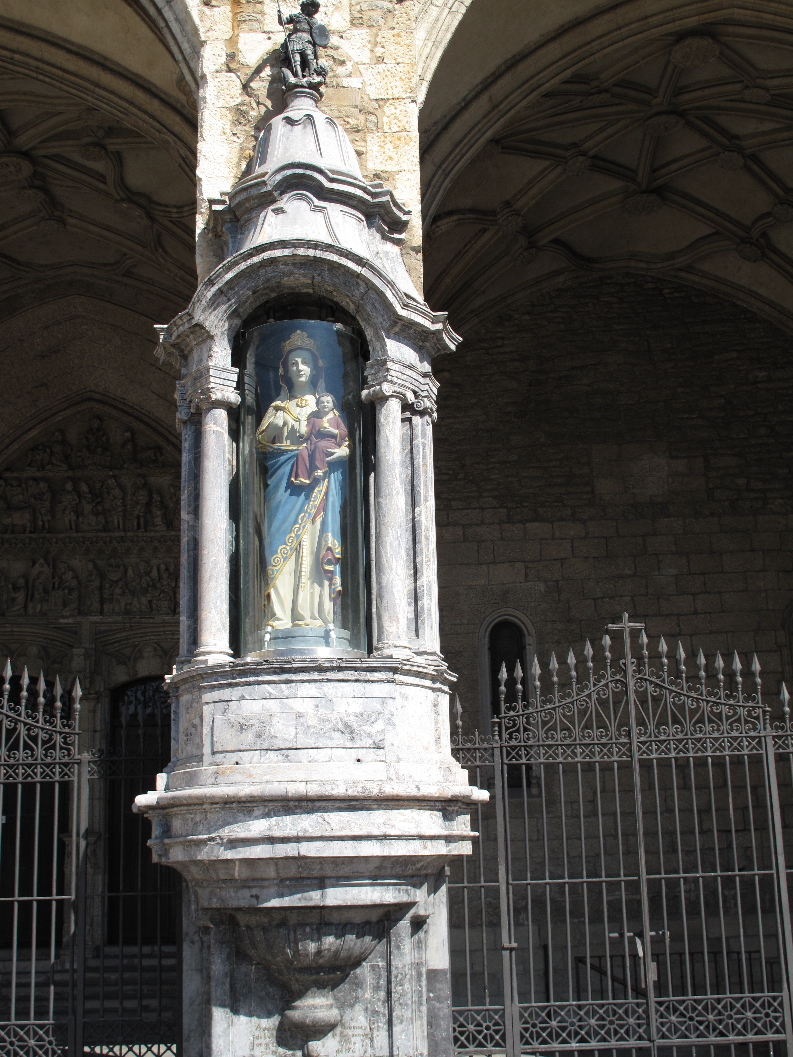 Virgen Blanca de Vitoria - Gazteiz